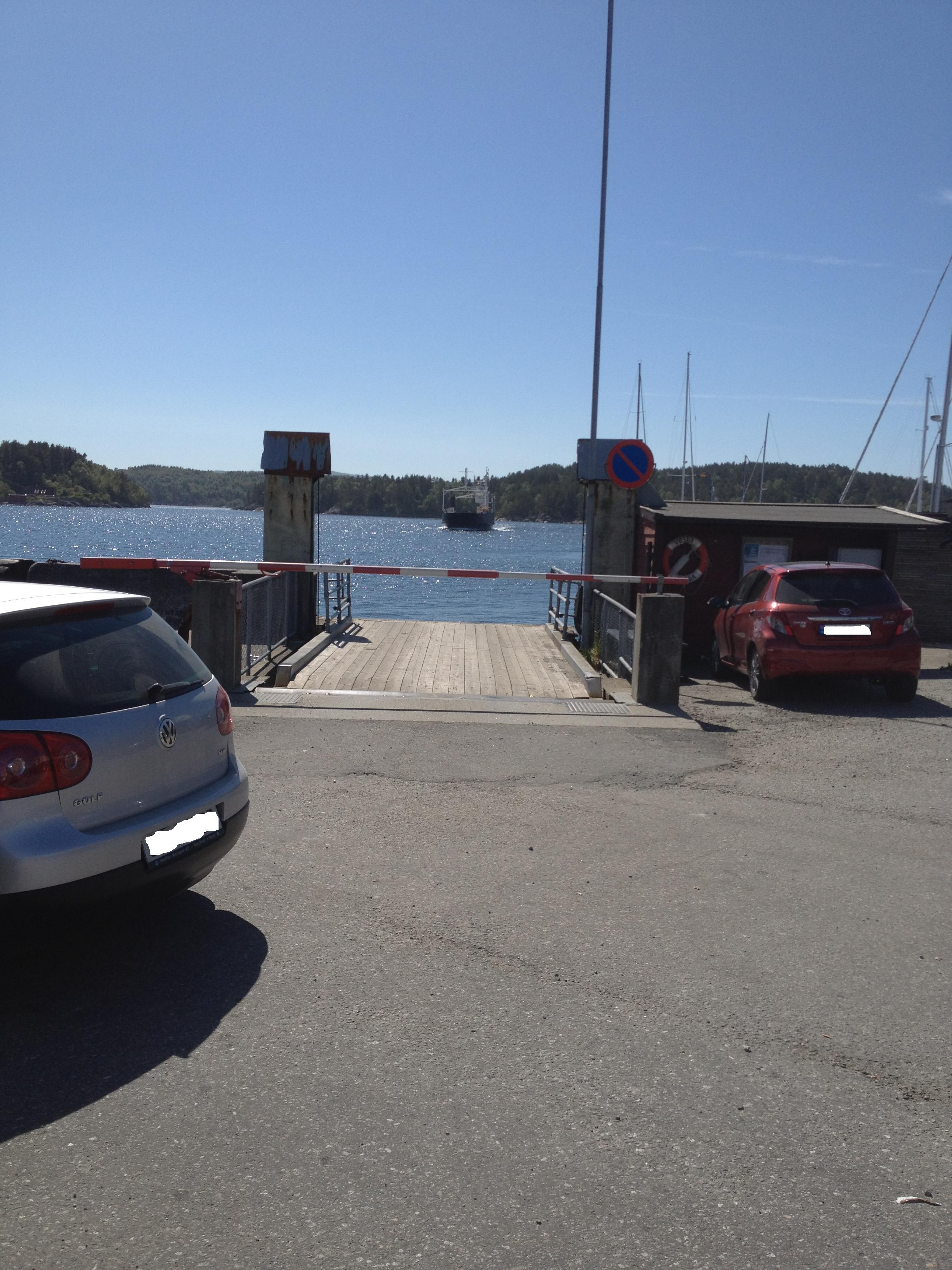 Hjellestad ferjekai i Bergen kommune.